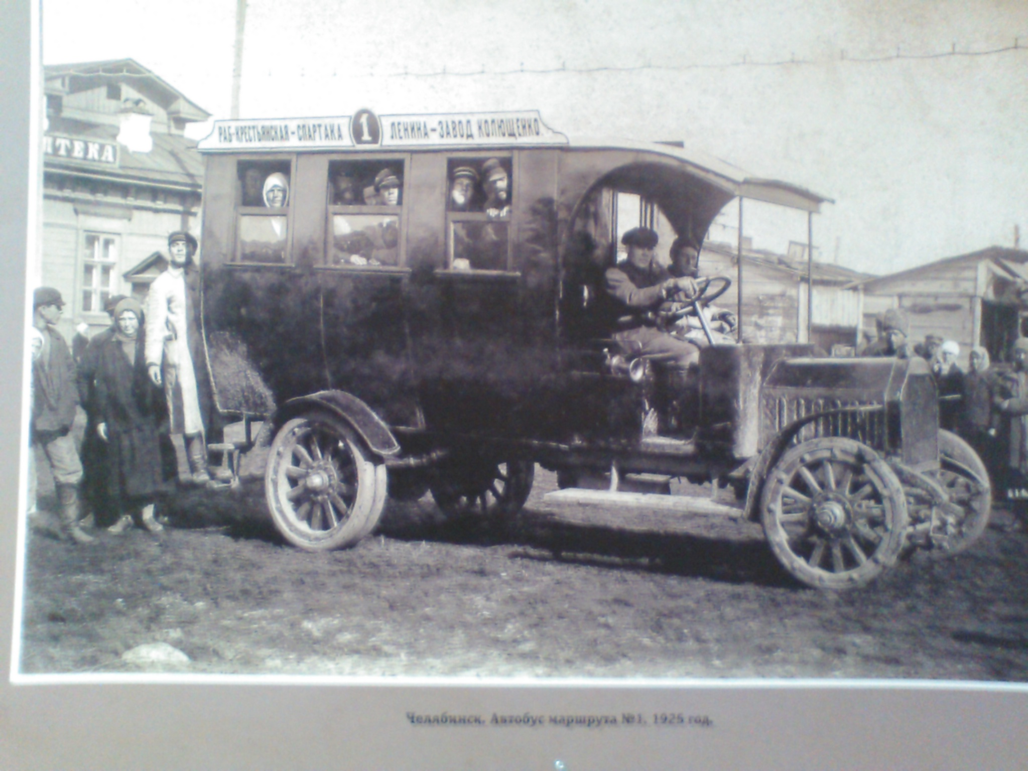 Челябинск.Автобус маршрута№1. 1925год